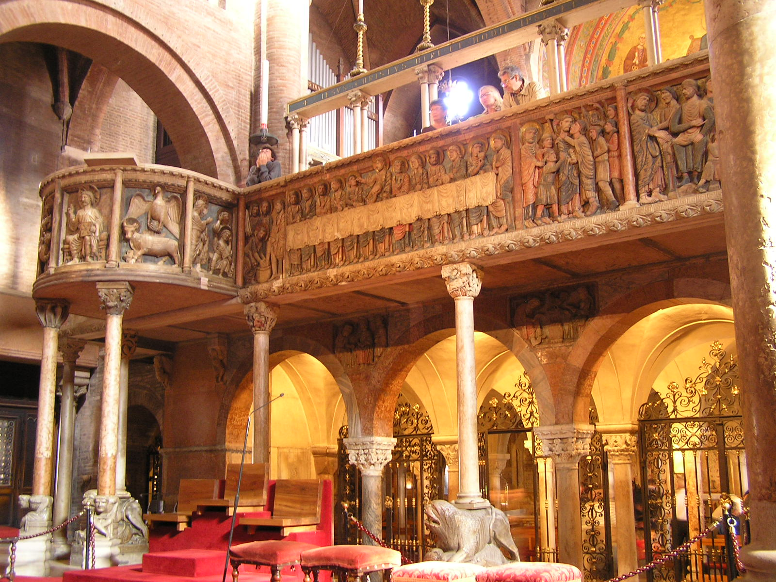 Pontile Campionese all'interno del Duomo, raffigurante l'Ultima Cena.